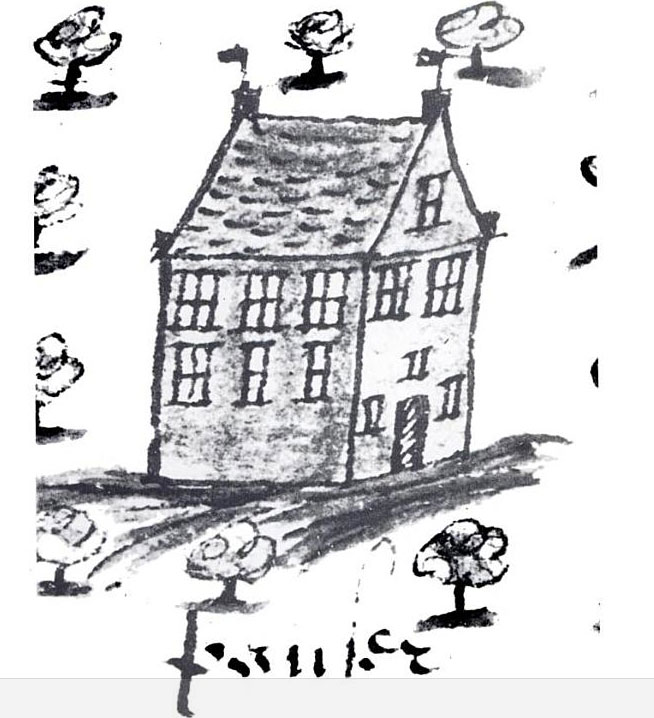 vergroting van een detail uit een kaart van 1626